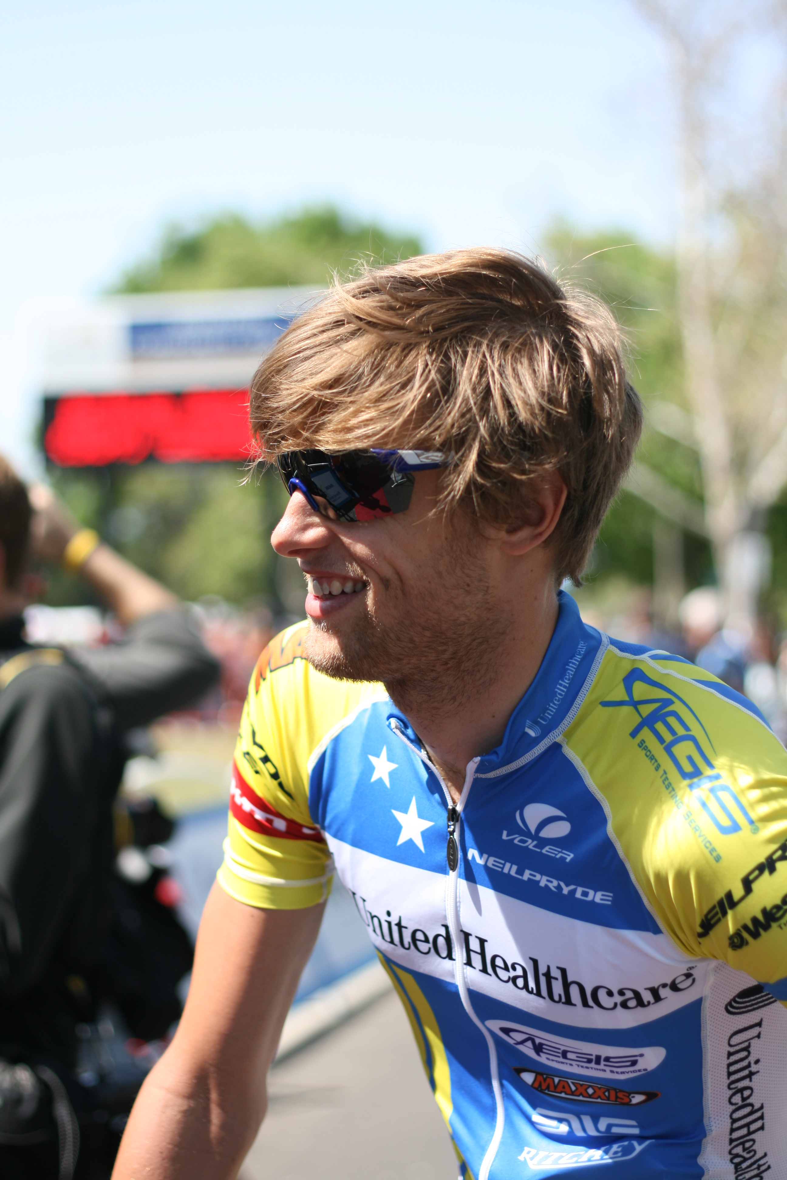 Ciclista de las Antillas Holandesas Marc De Maar en el Tour de California 2012 Unknown